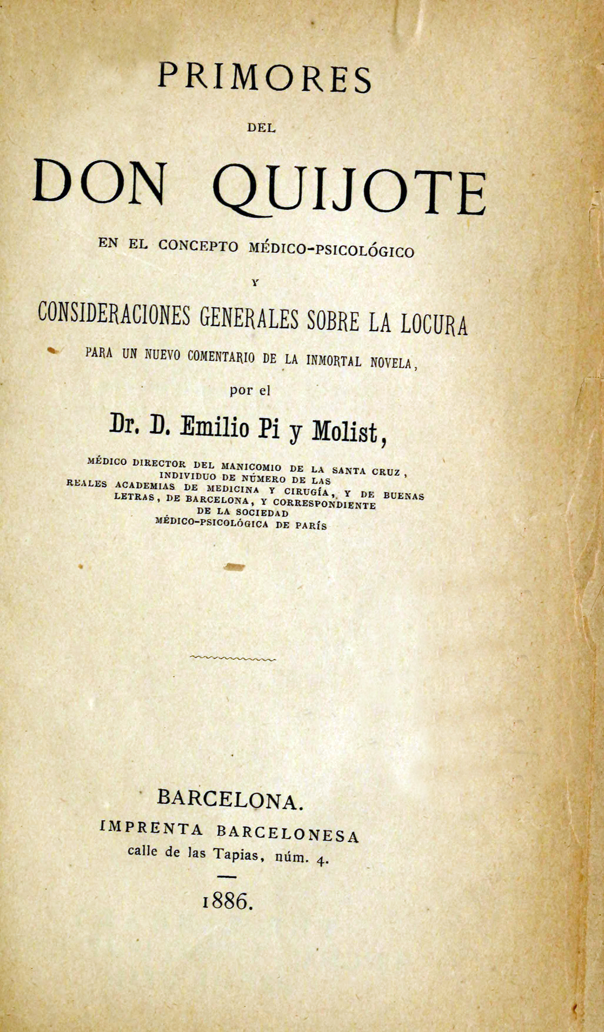 Primores del Don Quijote en el concepto médico-psicológico y consideraciones generales sobre la locura para un nuevo comentario de la inmortal novela.